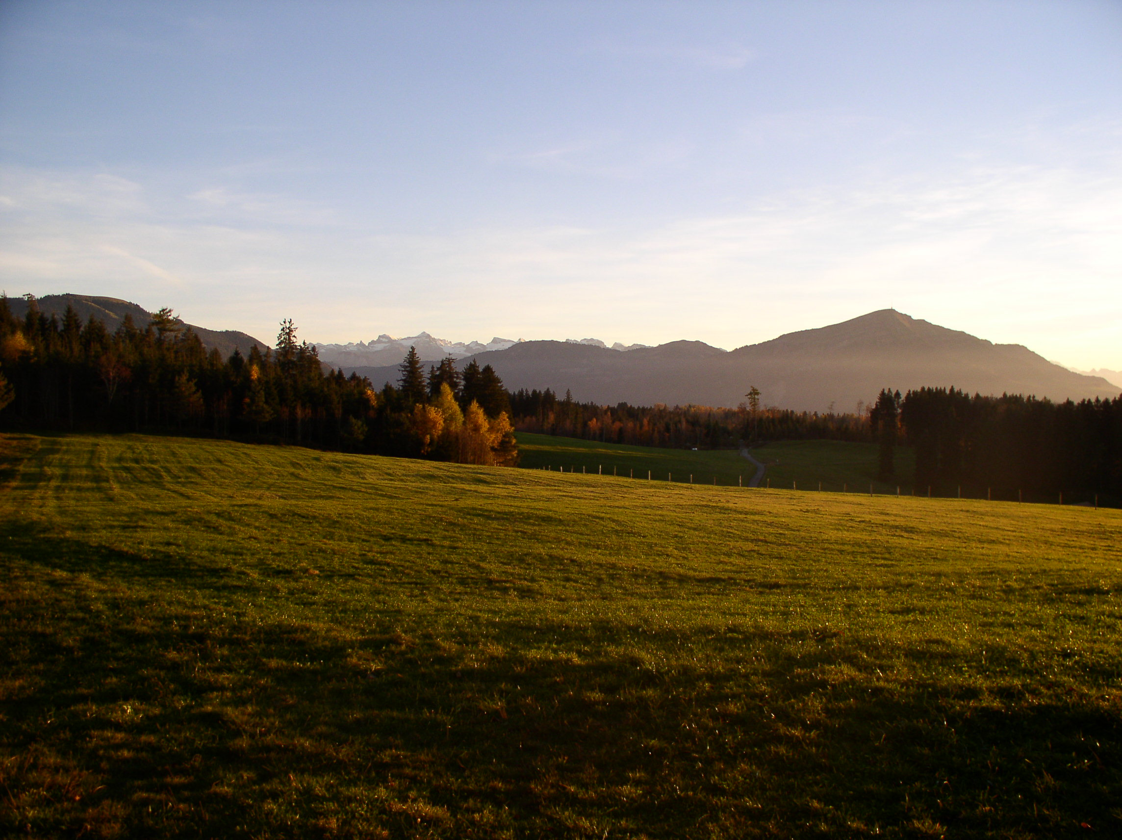 Description: Landschaft auf dem Zugerberg in südlicher Richtung Source: photo taken by me, October 2005 Photographer: Baikonur